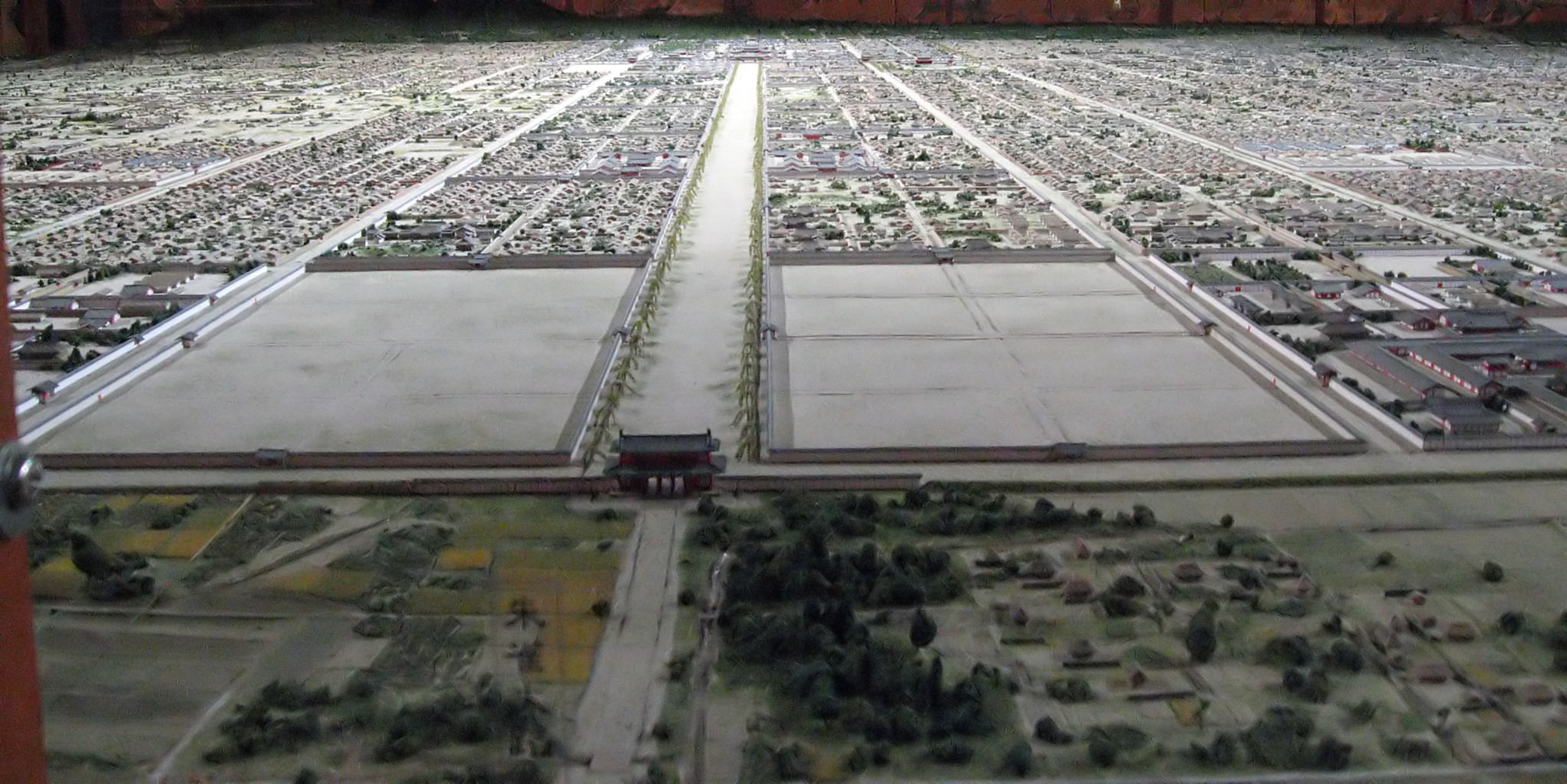 SuzakuOji street of Heiankyo. 羅城門から見た平安京朱雀大路 復元模型（京都創世館）